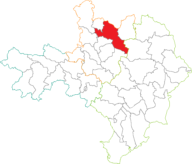 Situation du canton dans le département du Gard (France)